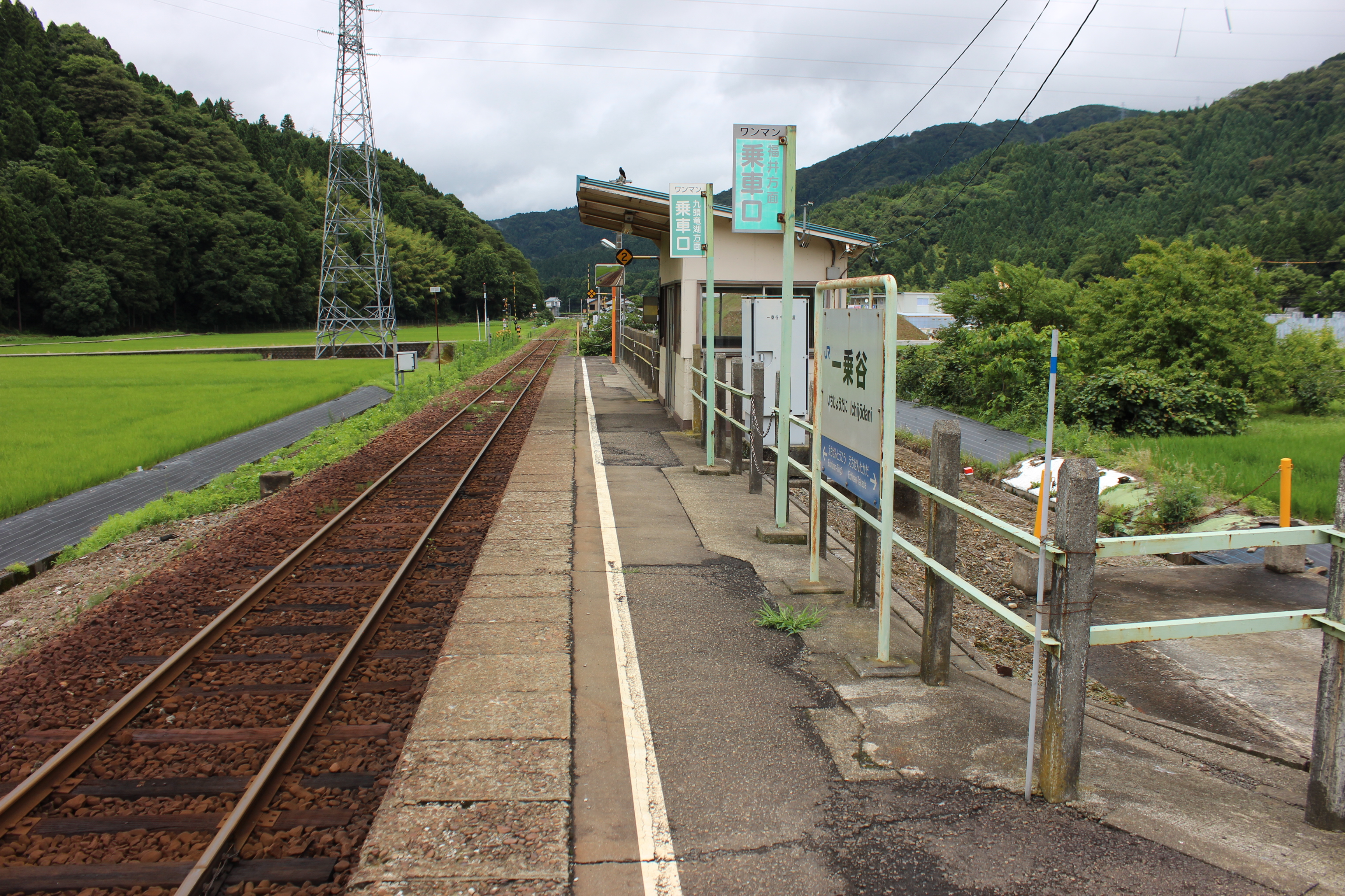 一乗谷駅のホーム・待合室 Canon EOS Kiss X5